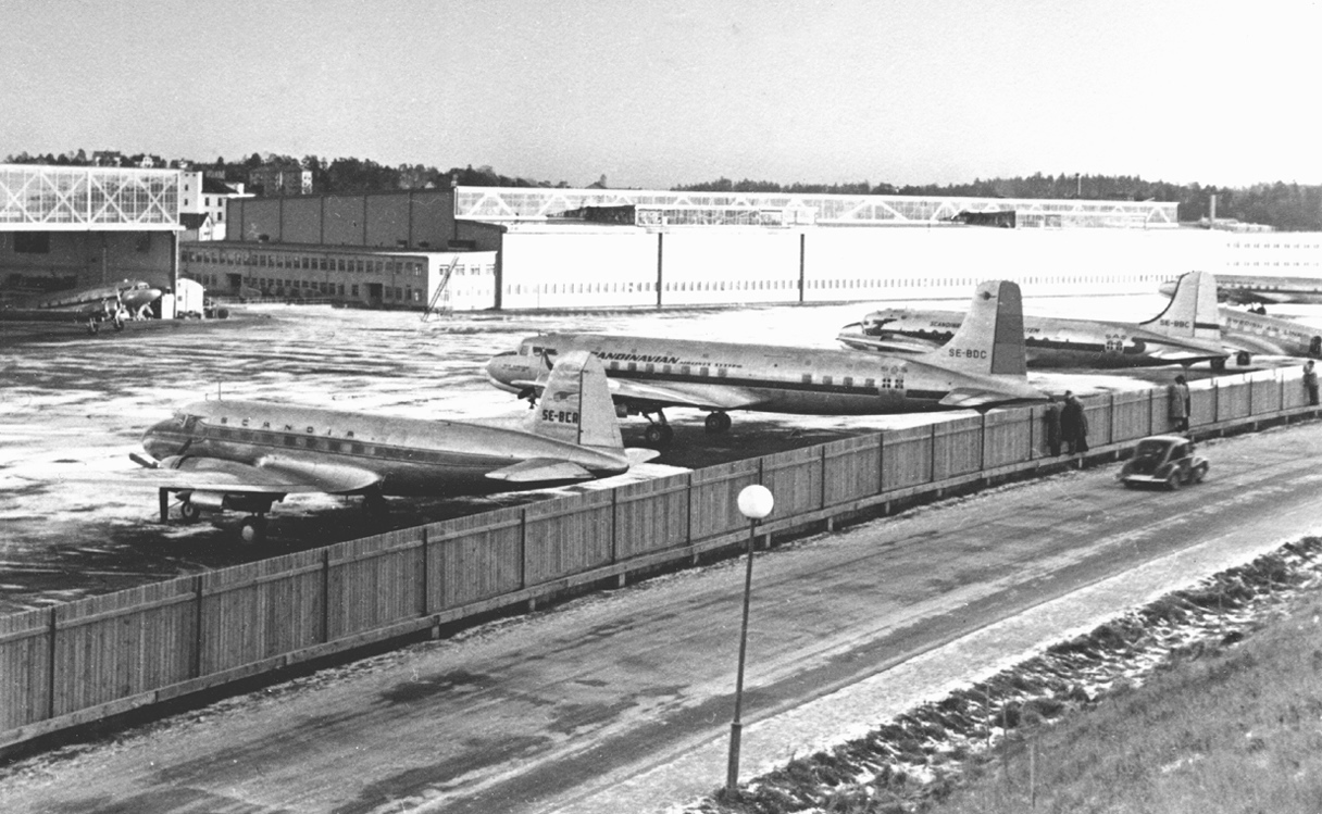 Bromma Airport, Stockholm. Inaugural of Hangar 3 1948.